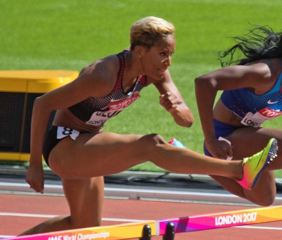 d7_5 100mH